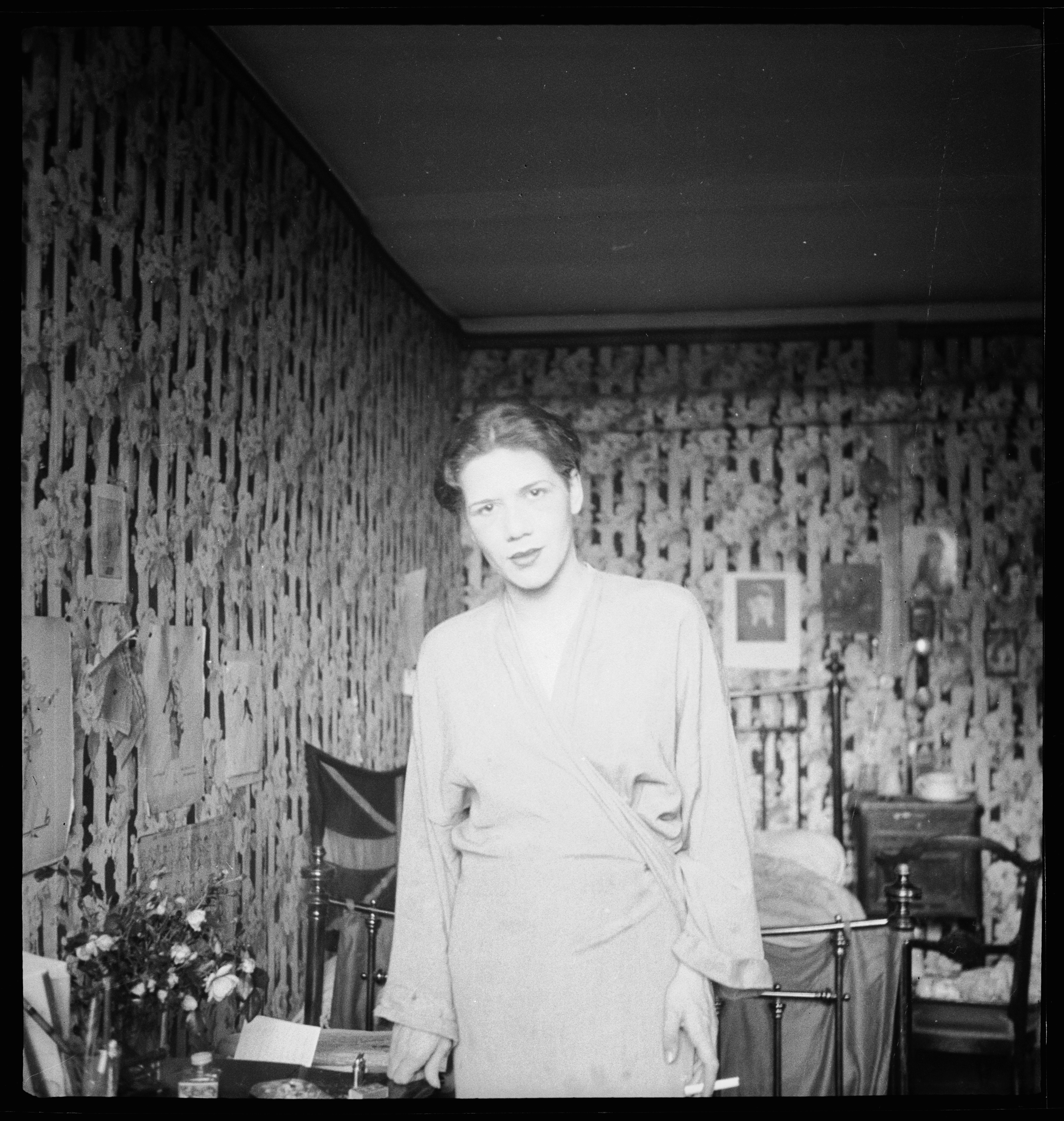 Frankreich, Paris: Menschen; Mopsa Sternheim